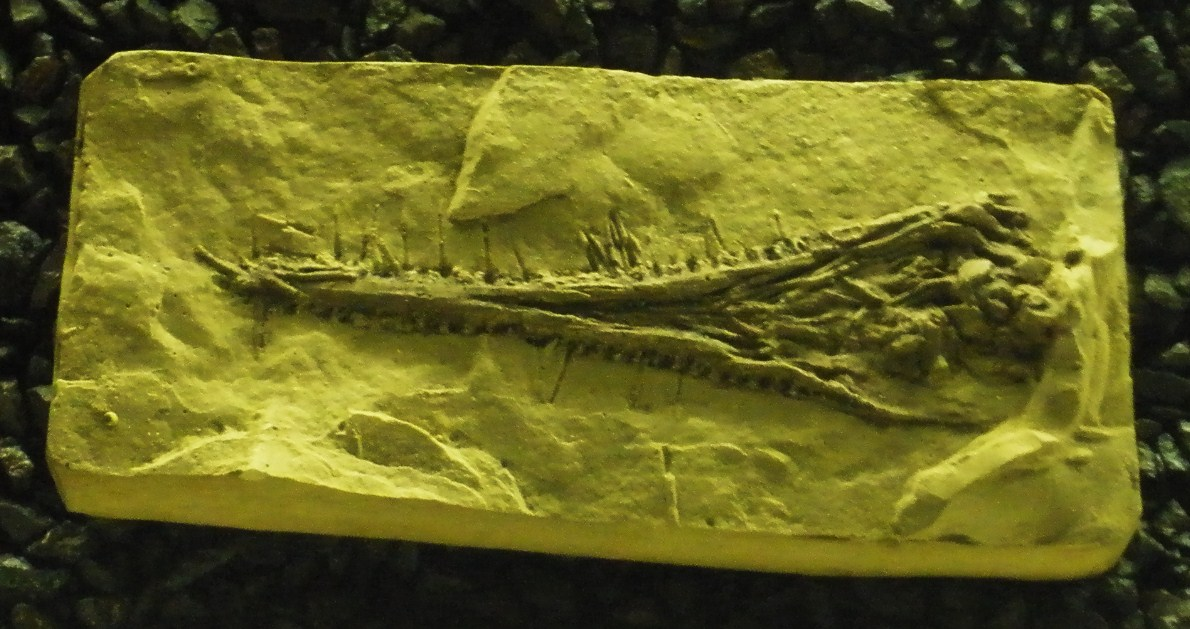 Fossil of Stereosternum, an extinct reptile- Took the photo at Senckenberg Museum of Frankfurt